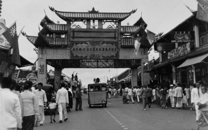 Foto. Chinese erepoort over de Groote Postweg in Bandoeng ter gelegenheid van het huwelijk van Prinses Juliana en Prins Bernhard